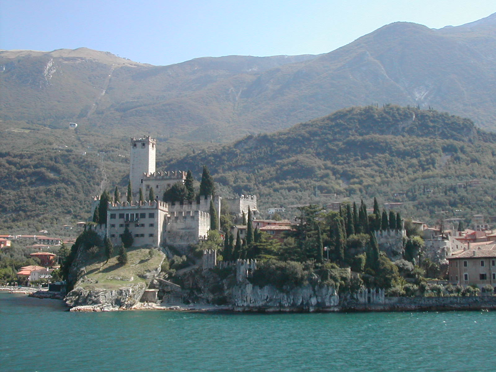 Scaligeri castle in Malcesine, Lake Garda, Italy